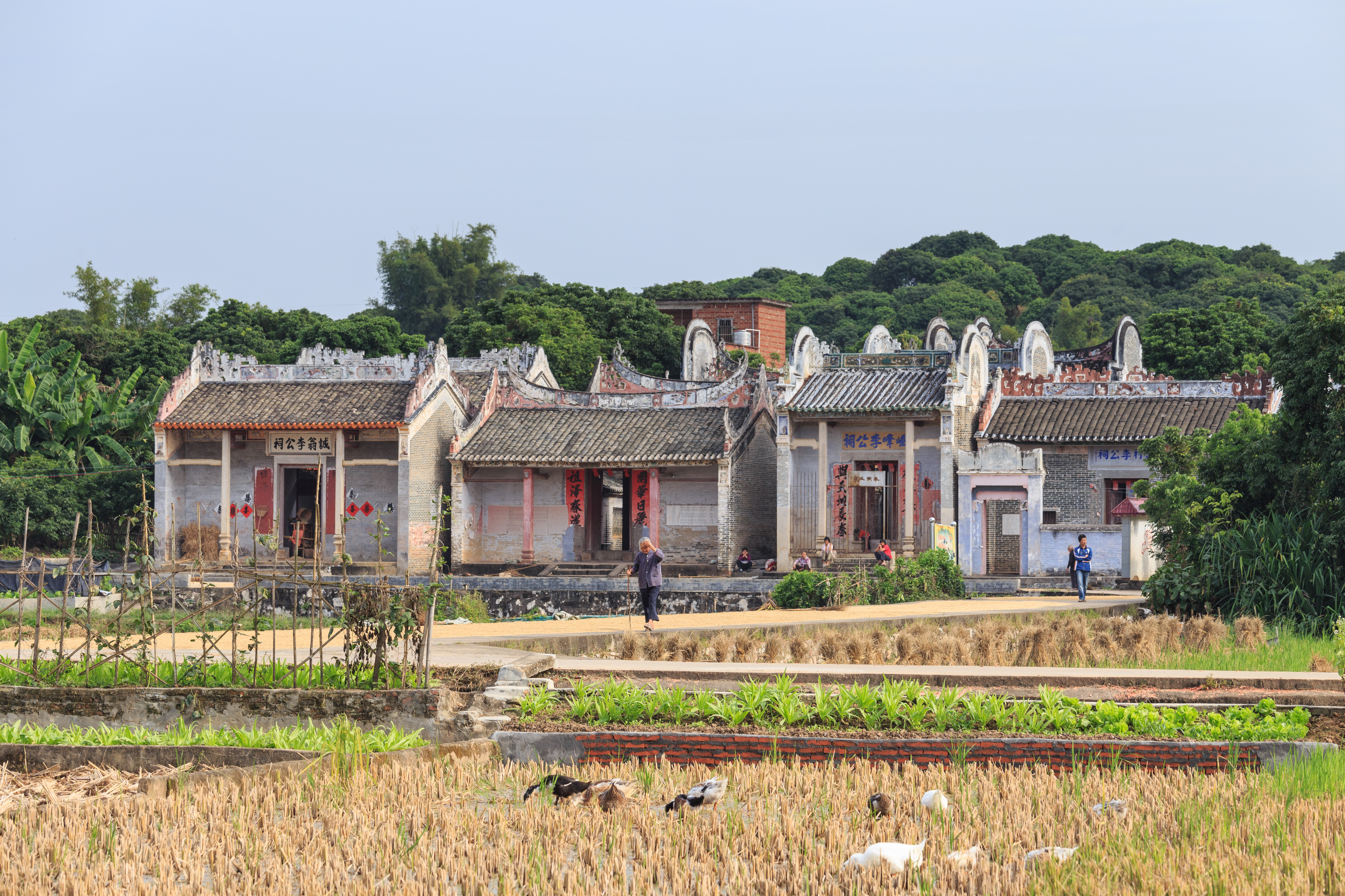 大湾民居 东风村——诚翁李公祠、峻峰李公祠、绿村李公祠